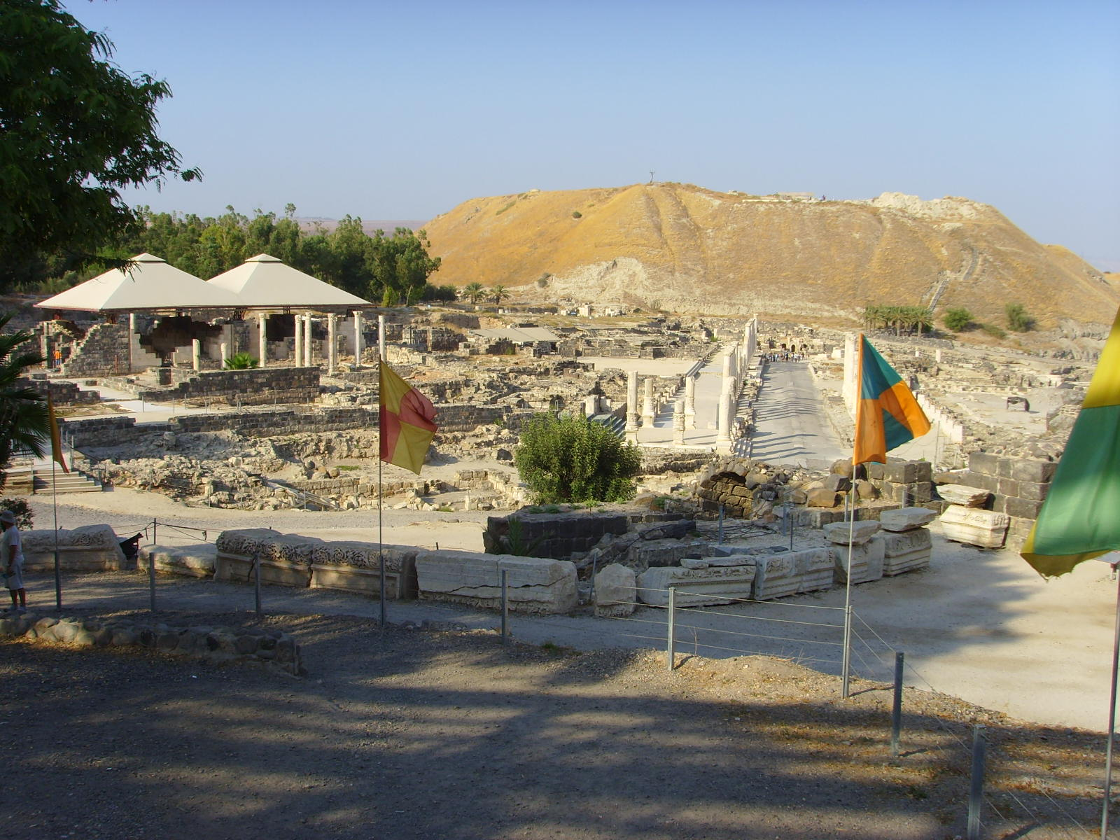 Beit She'an Source: self-made Date: October 2007 Author: Effi Schweizer